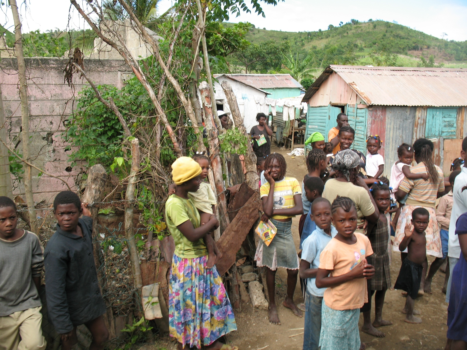 Famiglie di Braceros in un Batey haitiano nella Repubblica Domenicana